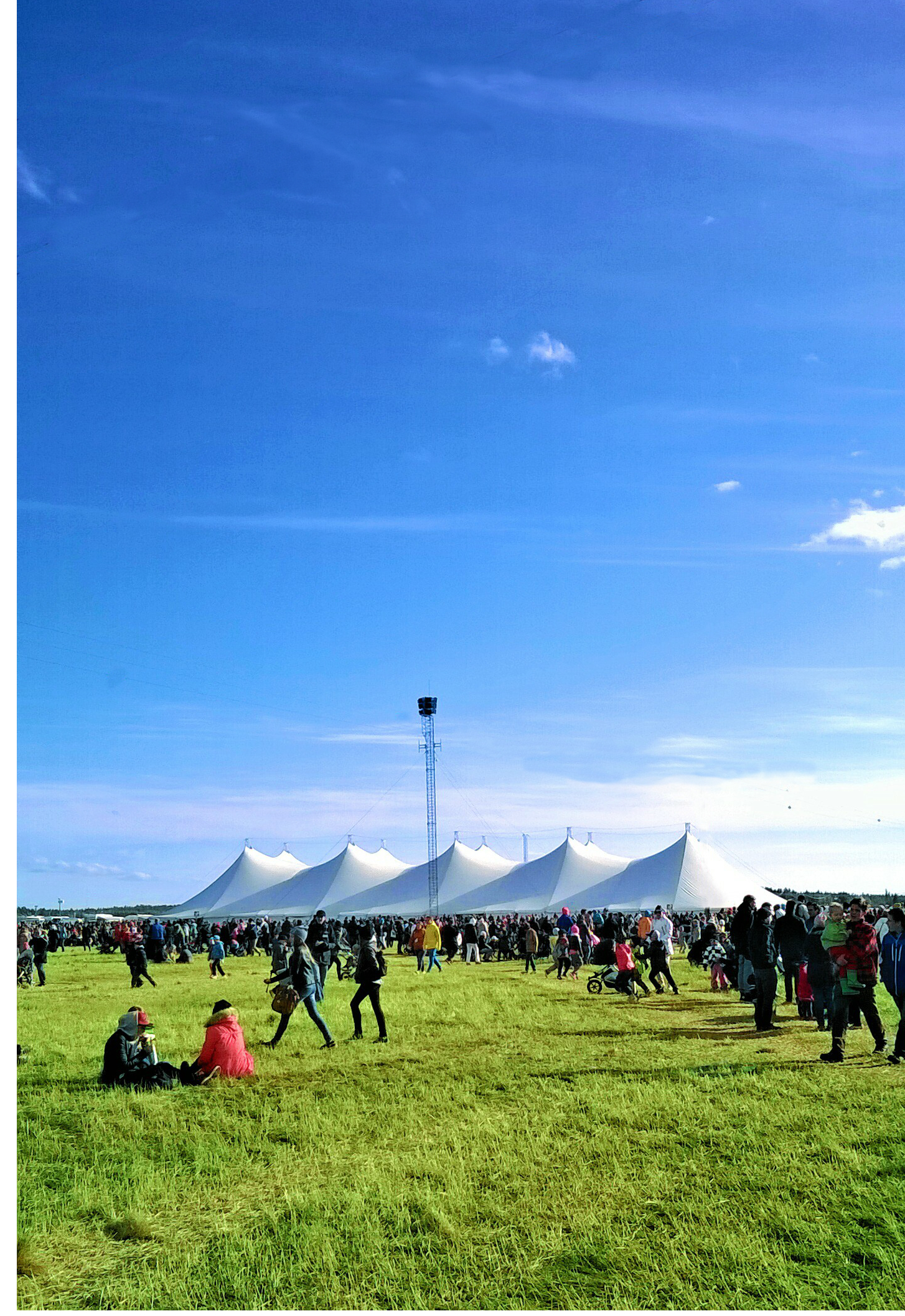 suviseurateltta 2009